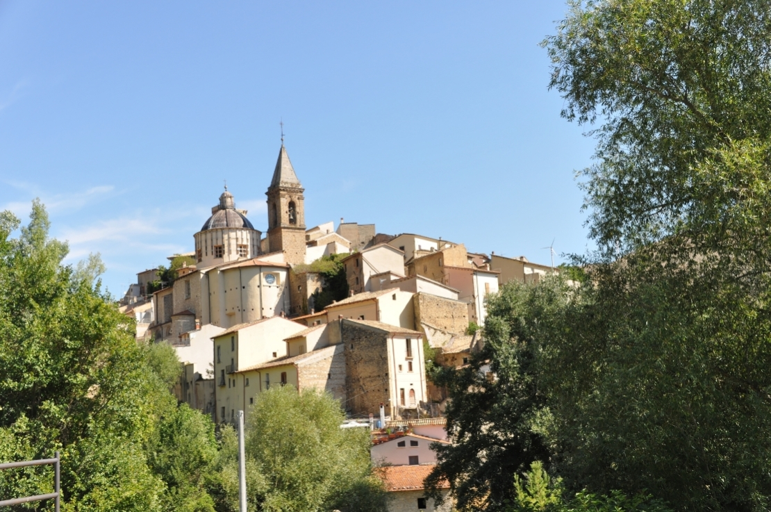 Cocullo 2012